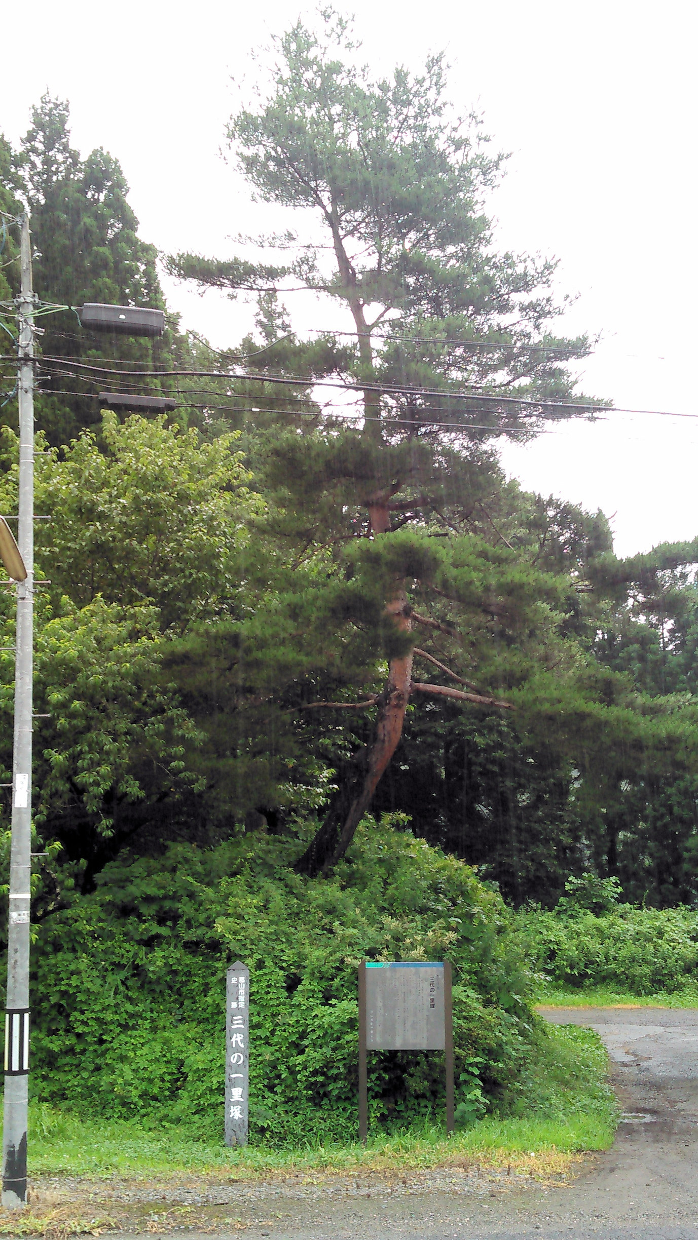 郡山市湖南町の湖南中学校バス停脇にある三代の一里塚